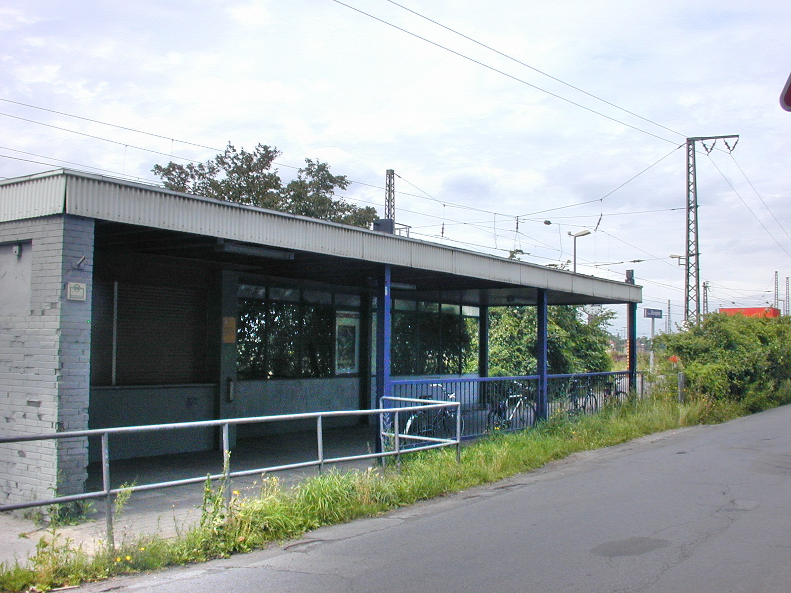 Ehemaliges Empfangsgebäude Bahnhof Duisburg-Bissingheim